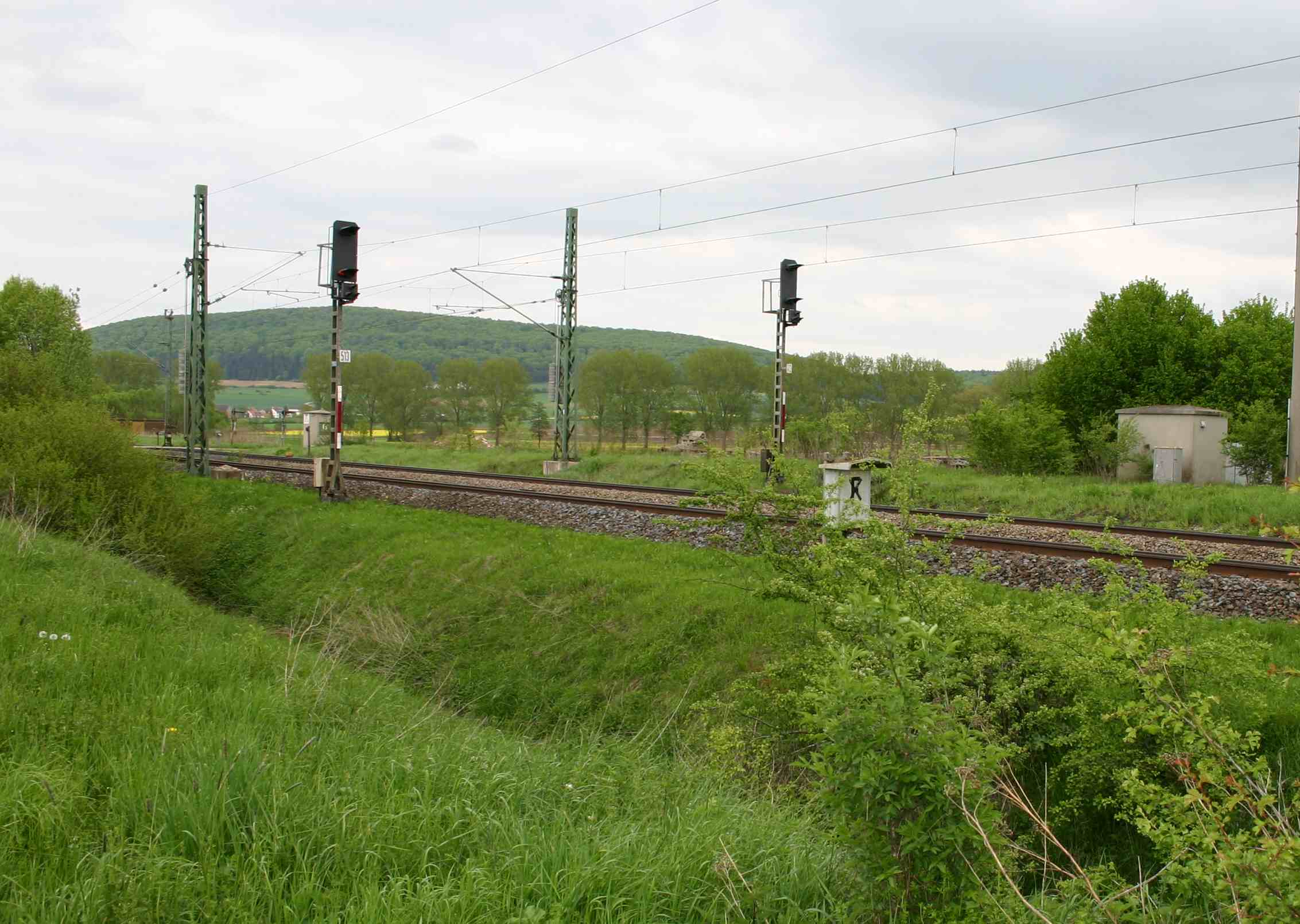 ehemaliger Bahnhof Grönhart